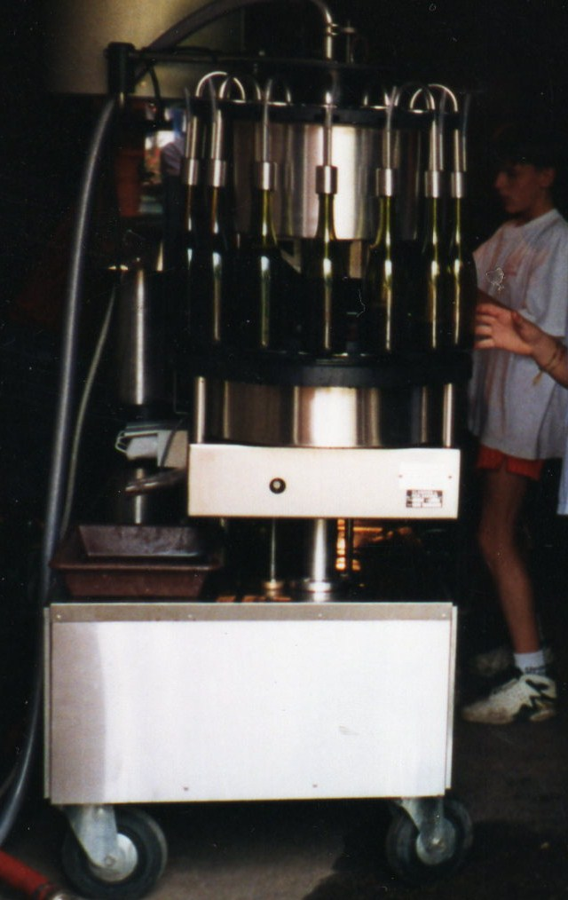 Mise en bouteille (vin) au domaine Mellenotte-Drillien à Mellecey (71)